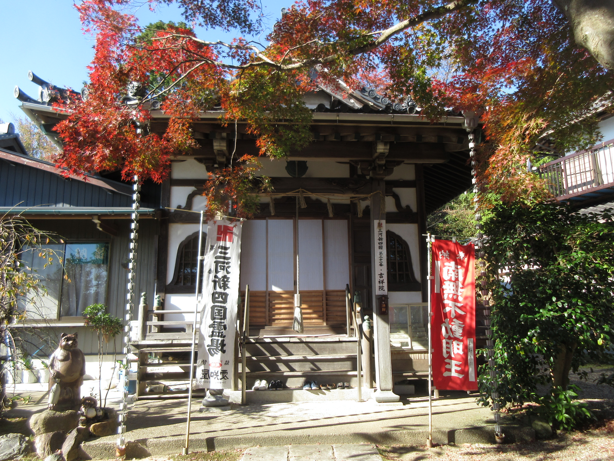 吉祥院（岡崎市明大寺町）